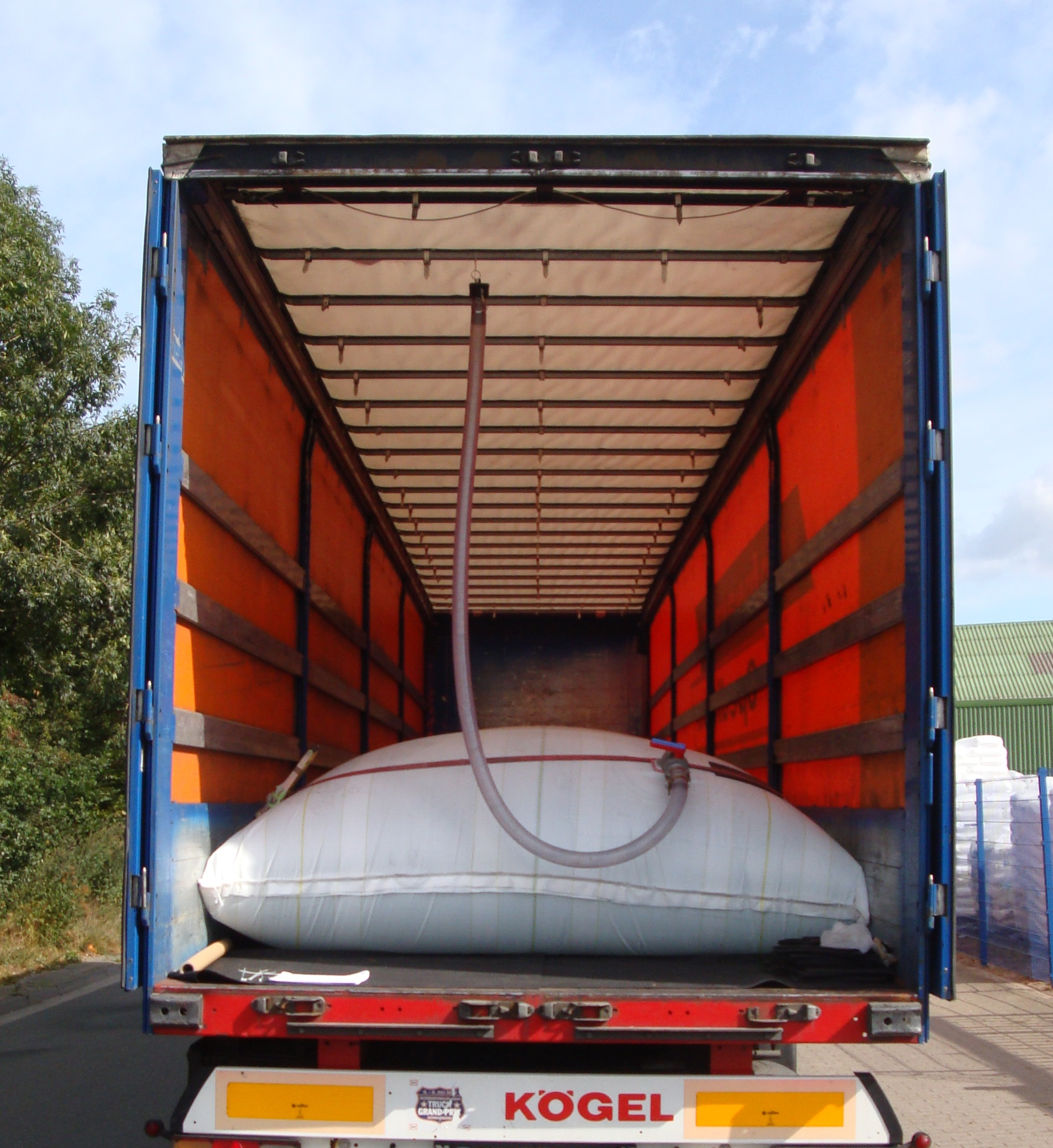 Büscherhoff-Mehrkammerflexitank in einem Kögel-Auflieger